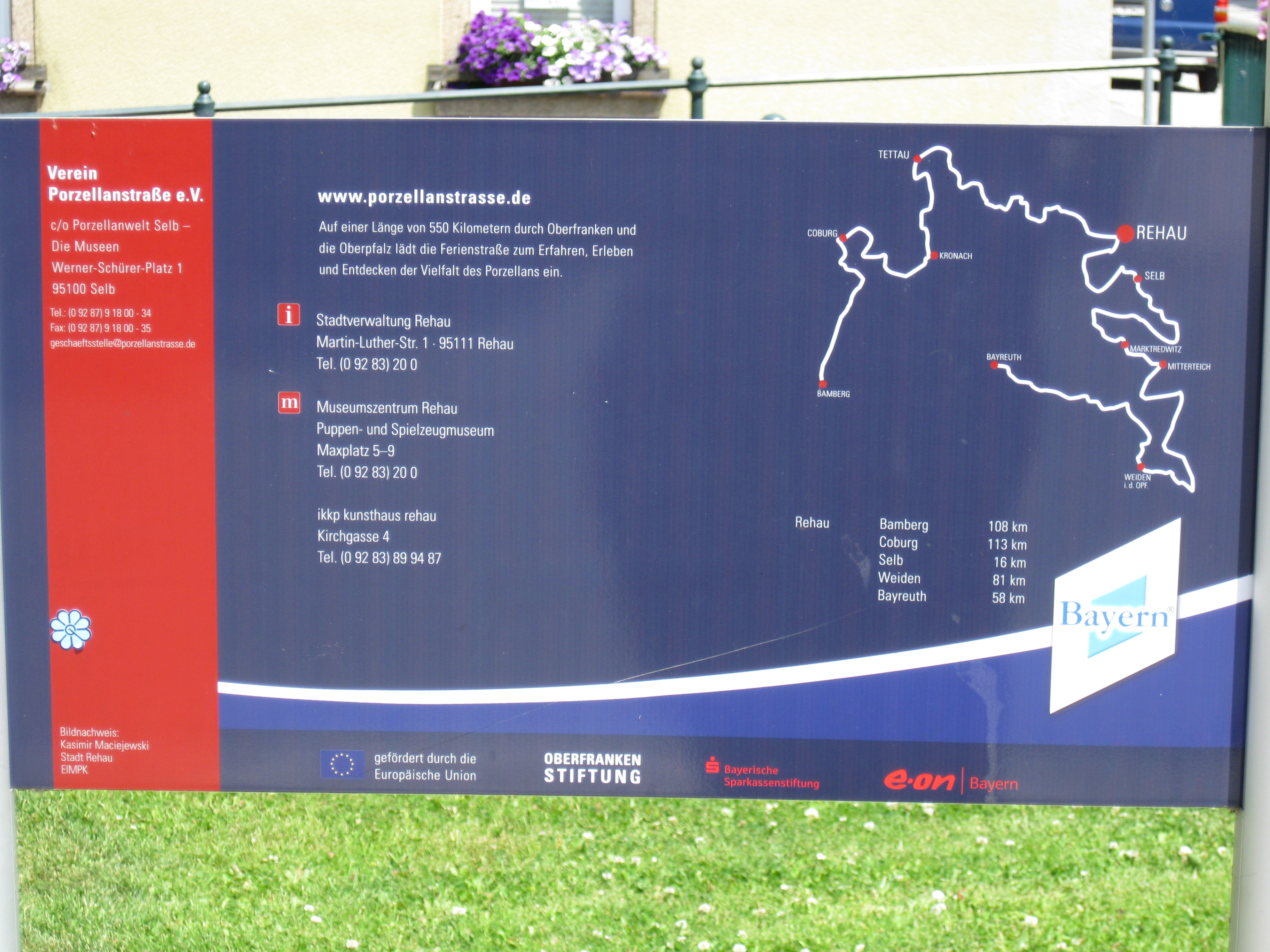 Ansichten von Rehau